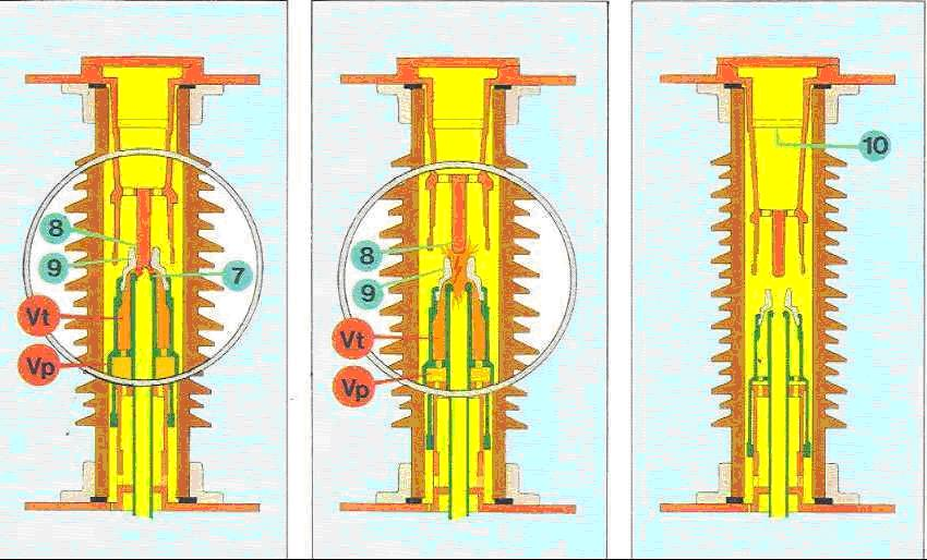 Image faite par le contributeur, déjà dans l'article correspondant de WP EN, accordée avec licence